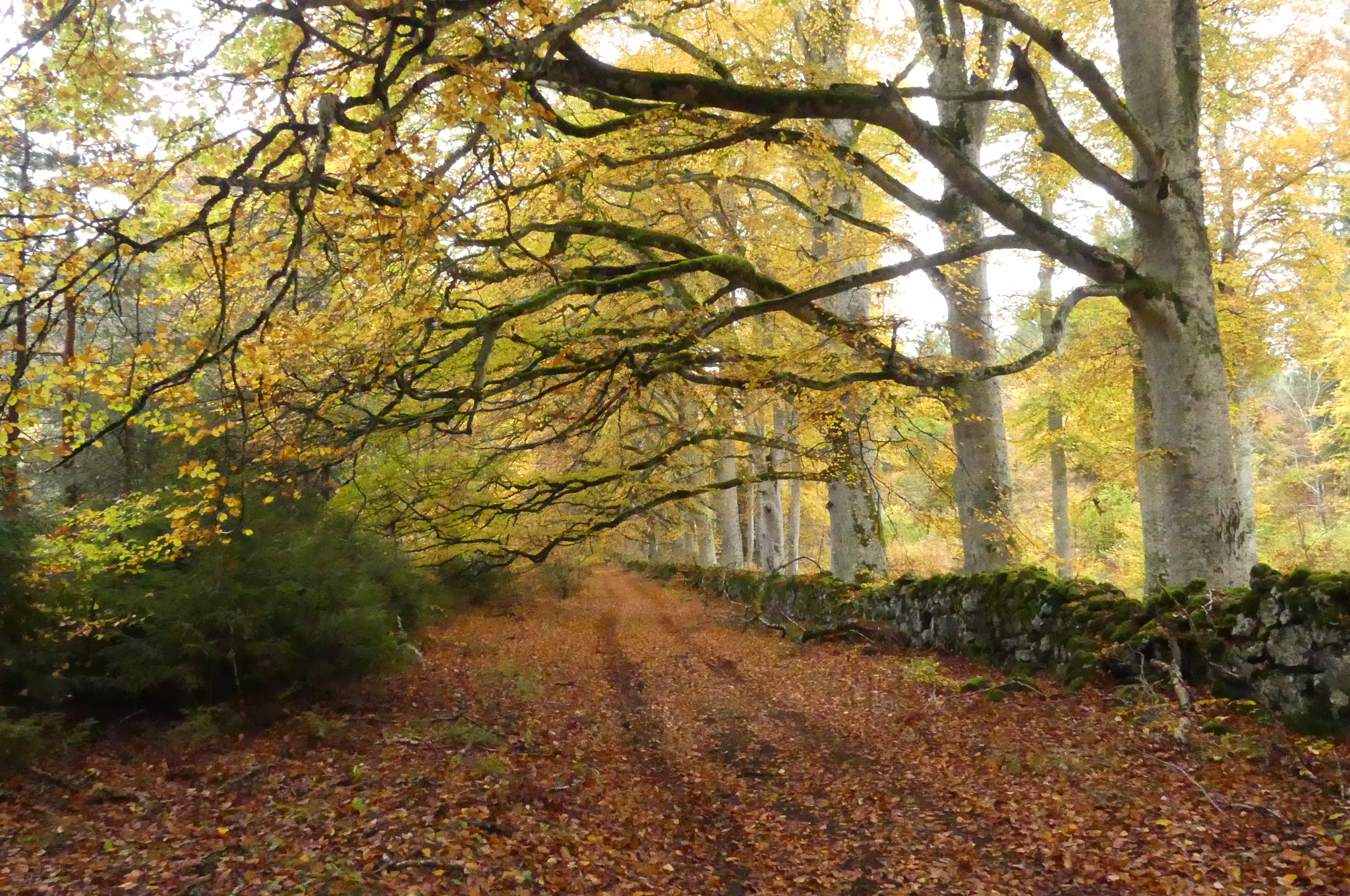 Les hêtres de la forêt d'Allagnat près du Puy-de-Dôme